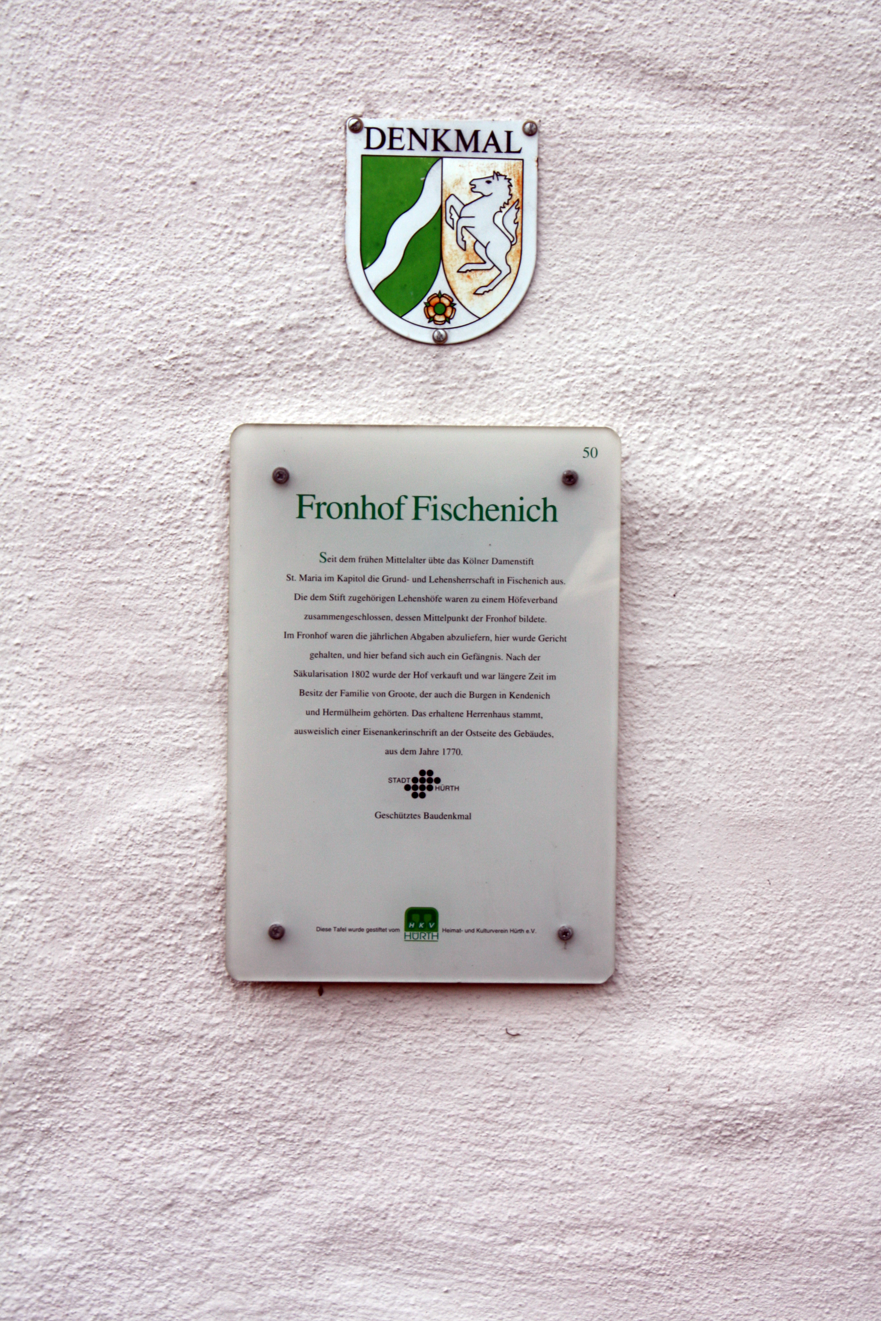 Hürth-Fischenich, städt. Infotafel Fronhof